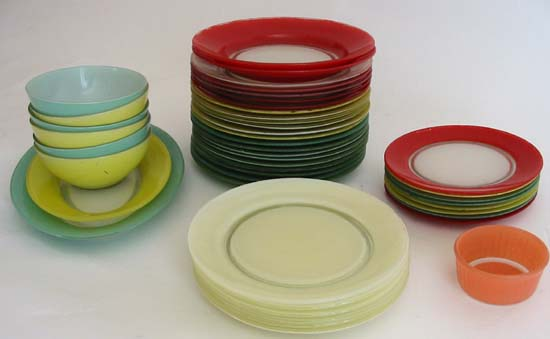 Vaisselle Duralex (tm) couleur, fin des années 1950